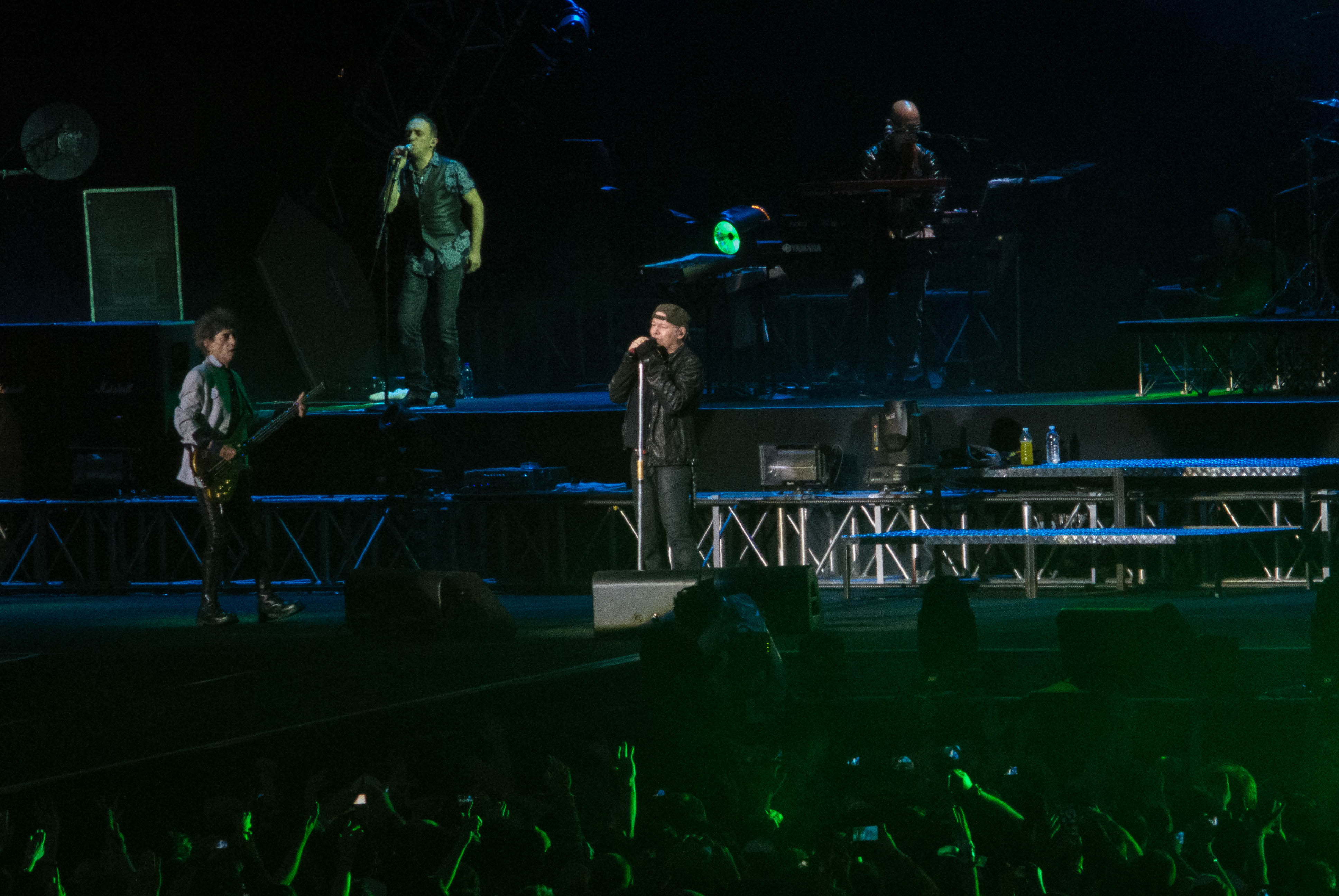 Vasco Rossi Concerto Torino 2013 -6236